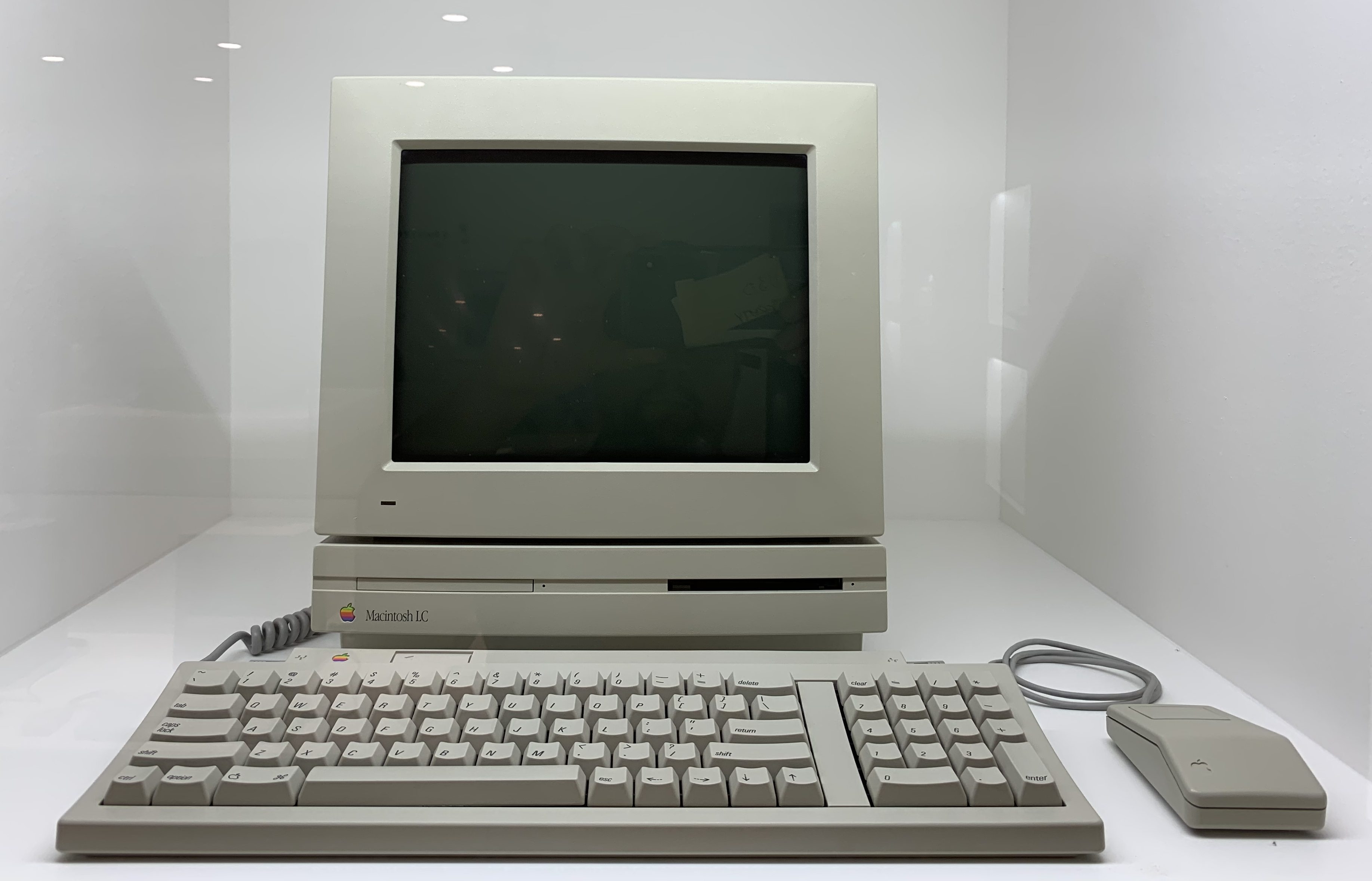 Apple Museum (Prague) Macintosh LC (1990).